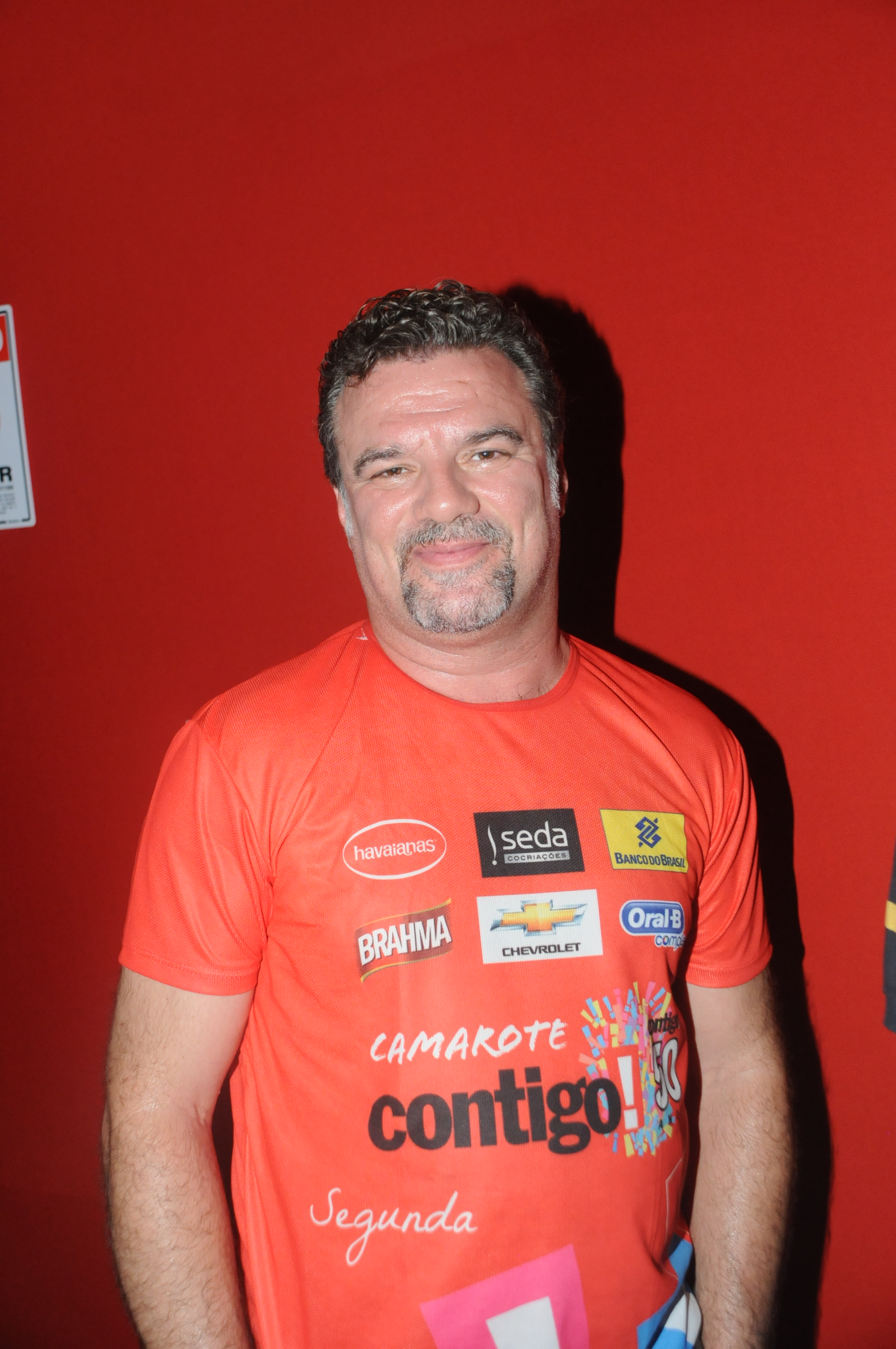 Adriano Garib